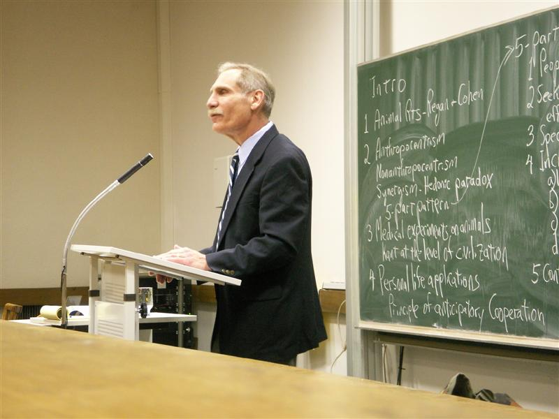 Prof. Dr. Peter S. Wenz at the Interdisciplinary Lectures on Animal Rights, Universität Heidelberg, 2006.